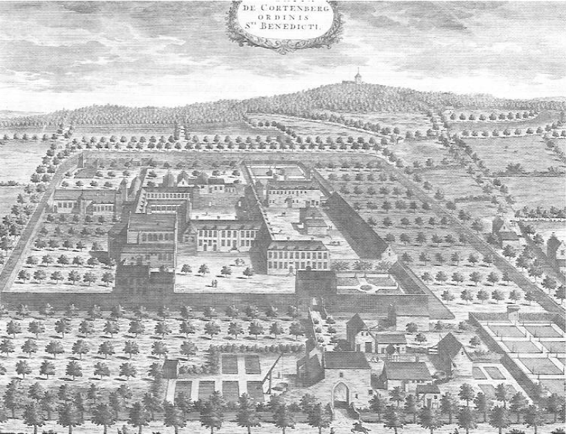 ABBATIA DE CORTENBERG ORDINIS STI. BENEDICTI. Bird's eye view of the benedictine abbey of Kortenberg. Etching, prent 34,8 x 45,6 cm; moet 36,3 x 47 cm; blad 45,1 x 52,2 cm. From: SANDERUS A., Chorographia Sacra Brabantiae, 's Gravenhage, C. Van Lom, 1726, I, p. 75-77